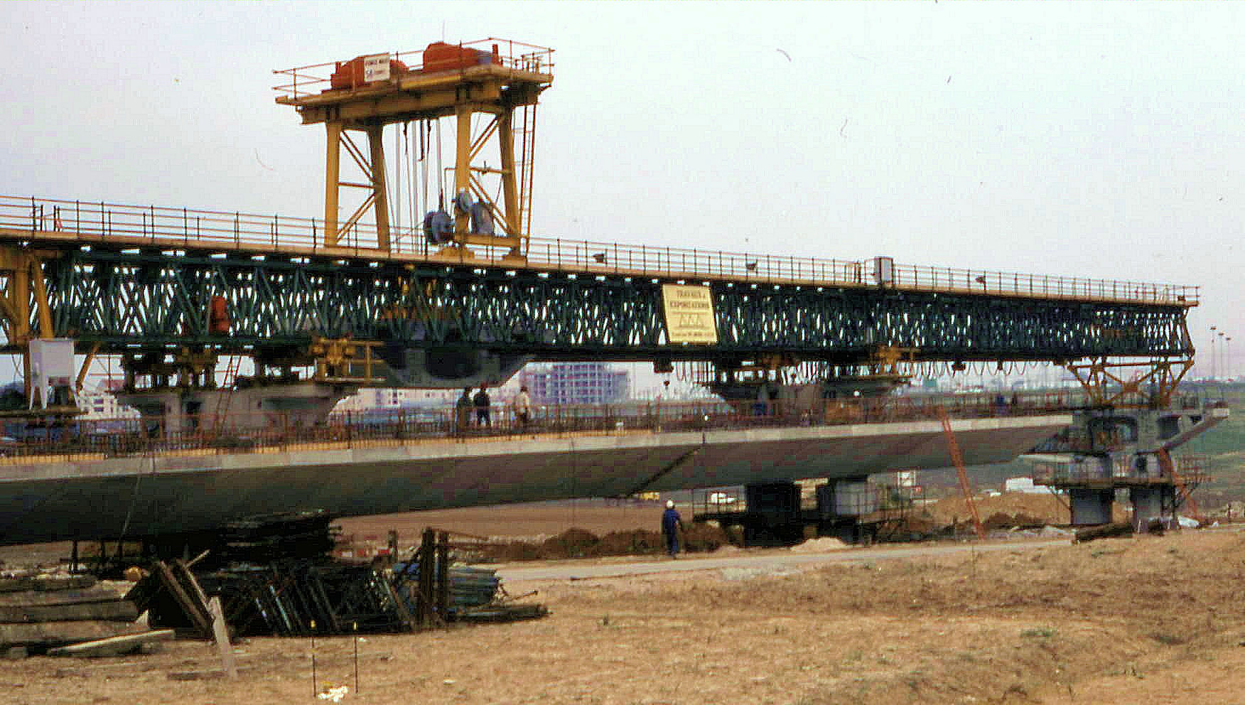 RER A - Marne-la-Vallée - Viaduc de Torcy - Construction de voussoirs préfabriqués - Poutre de lancement